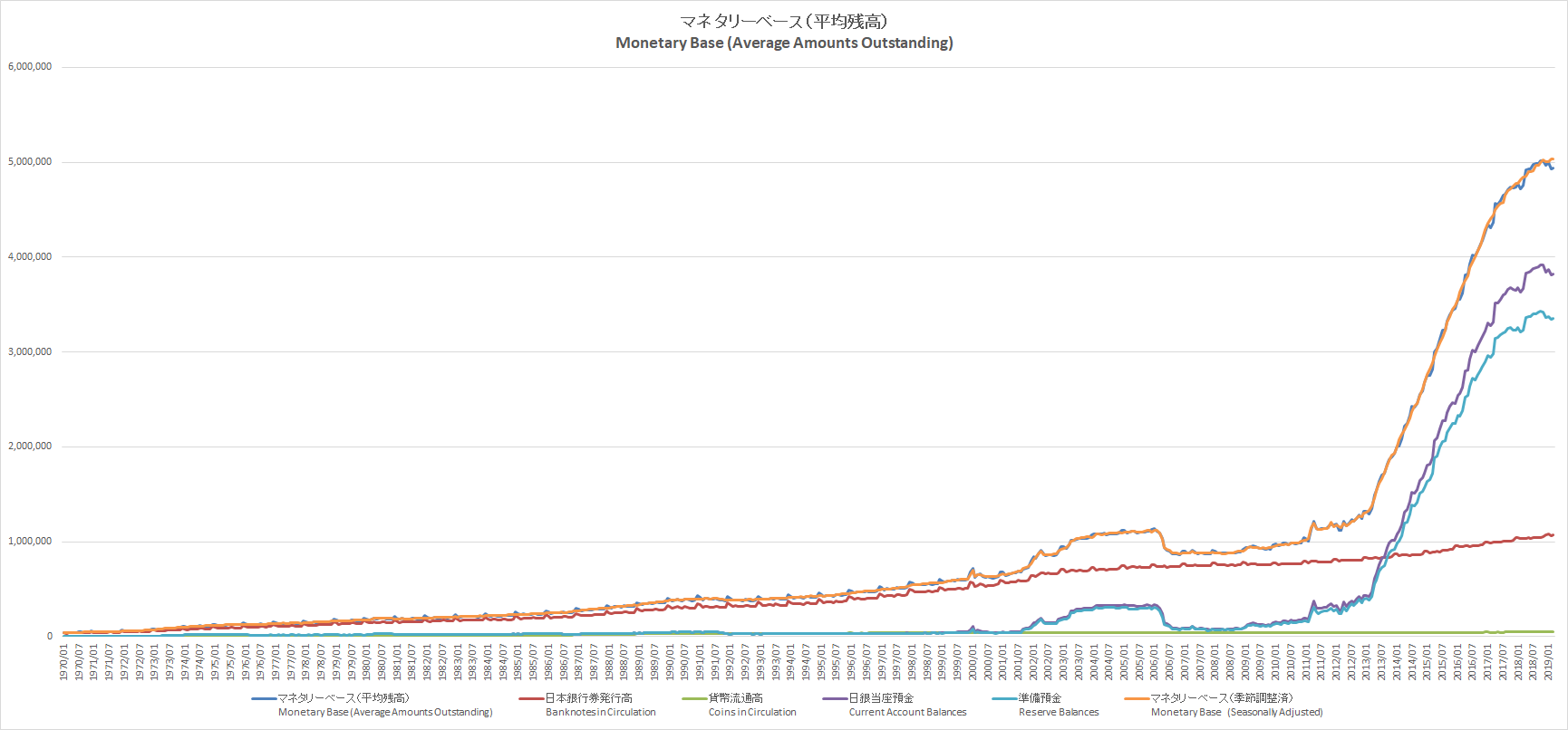 日銀のマネタリーベース。1970年から。 に公表された数値データより自作した。